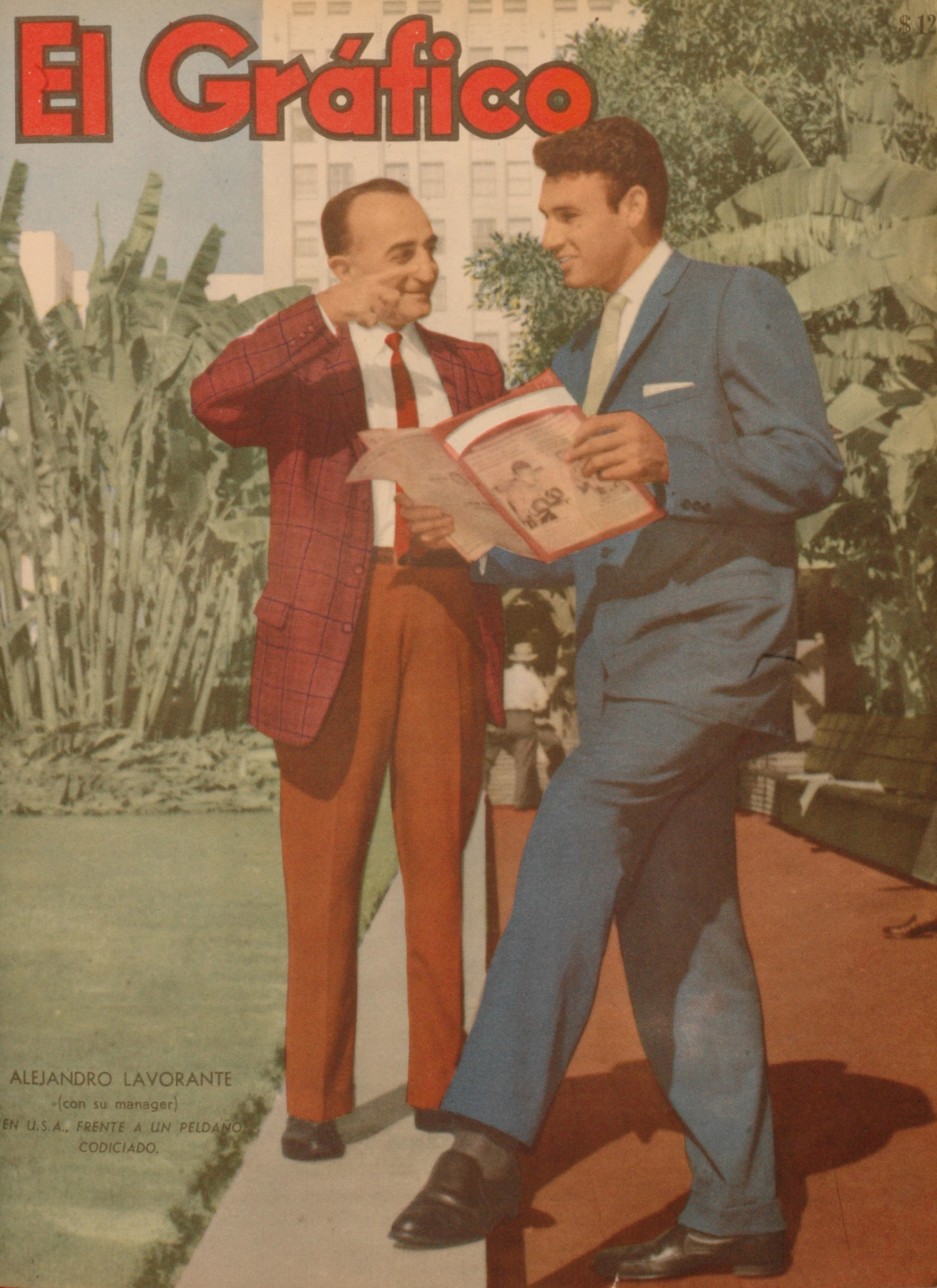 El Grafico del 17 de Enero de 1962. Edicion 2206